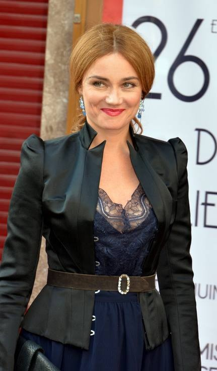 Marine Delterme à la cérémonie des Molières